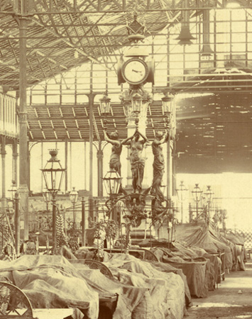 Fuente del mercado del Born, de Josep Fontserè.